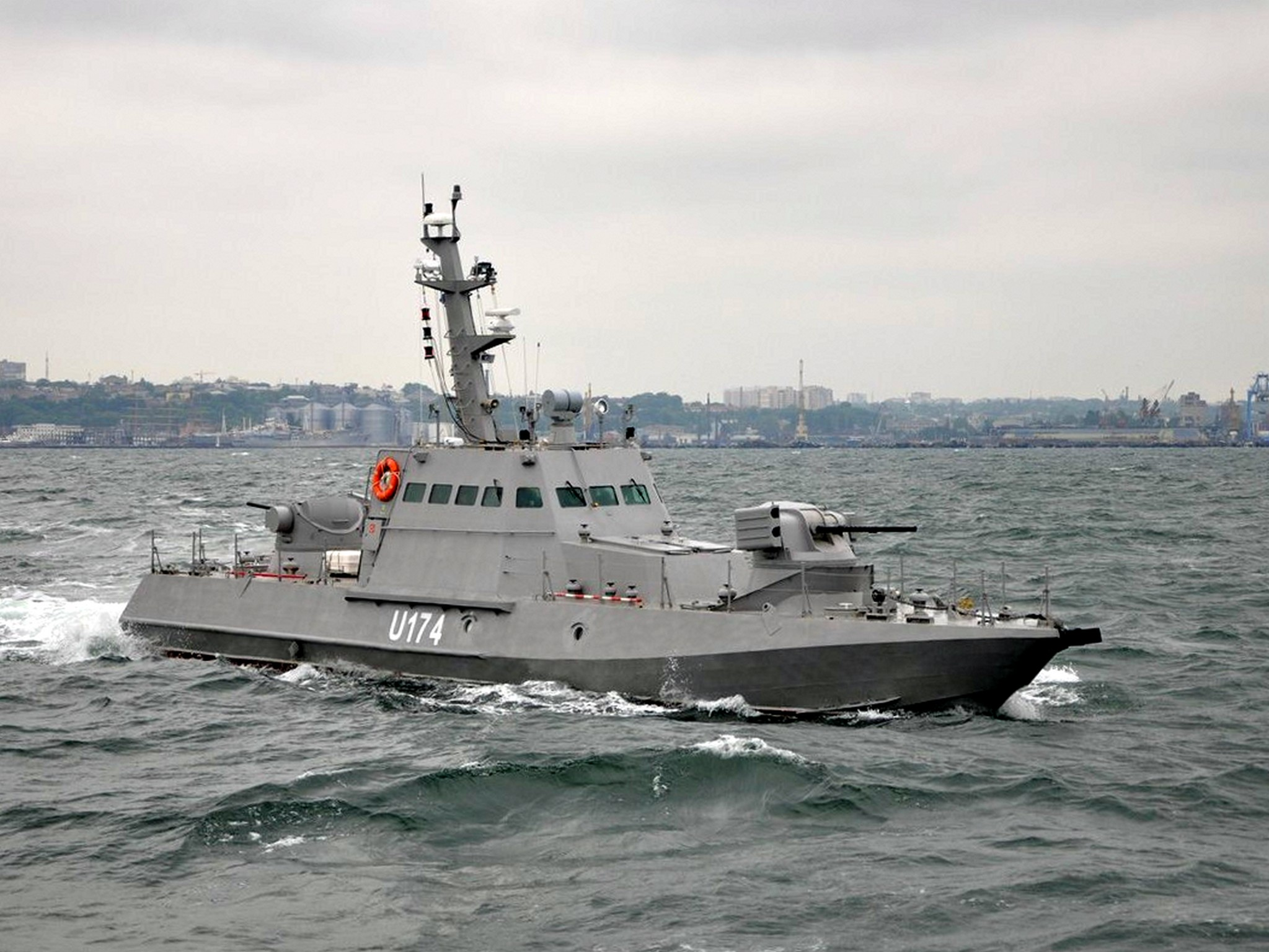 Два новозбудовані для Військово-Морських Сил Збройних Сил України малі броньовані артилерійські катери 2 червня, в ході випробувань в районі Одеської затоки, вперше здійснили спільне плавання. Під час виходу в море у складі тактичної групи катерів перевірено роботу систем і механізмів у штормових умовах. Матеріальна частина працювала в штатному режимі. Як планується ближчим часом малі броньовані артилерійські катери увійдуть до складу ВМС ЗС України. Two newly built small armour boats for the Ukrainian Navy undergo trials. There were checked their systems and sub-assemblies in storm conditions. The material part was in good state. Small armor artillery boats are expected to be put into service in the Ukrainian Navy. Прес-центр Командування ВМС ЗС України